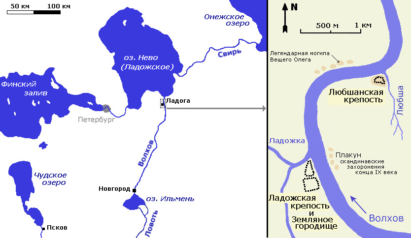 Map of ancient Rus' with detailed map for Ladoga and Lyubsha, first russian towns. Карта взаимного расположения Ладоги и Любшанской крепости нарисована на основе карты с [1] (статья А. Чернова)